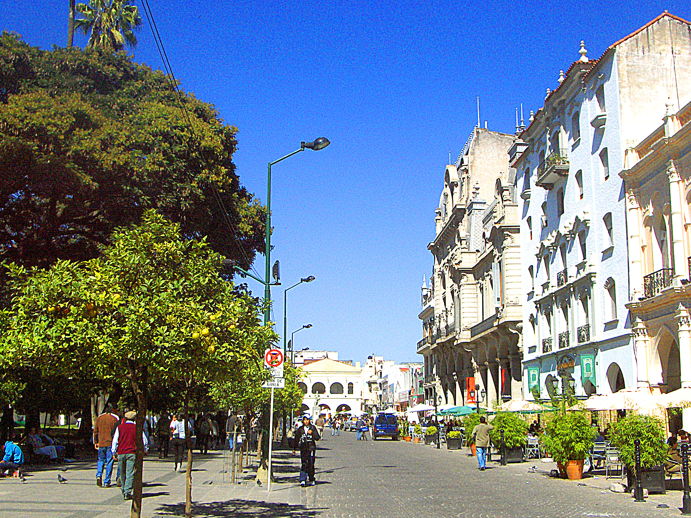 Mitre Street, Salta, Argentina.